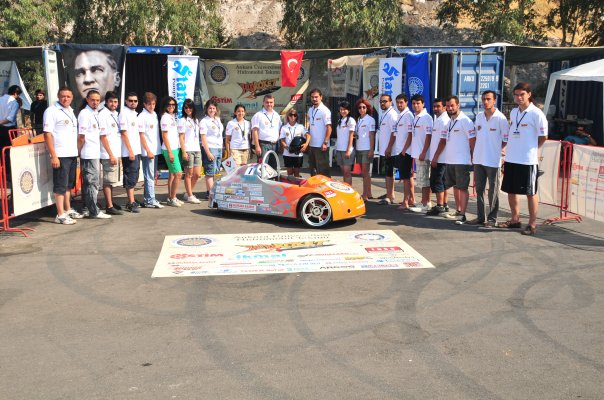 Ankara Üniversitesi Hidromobil Takımı